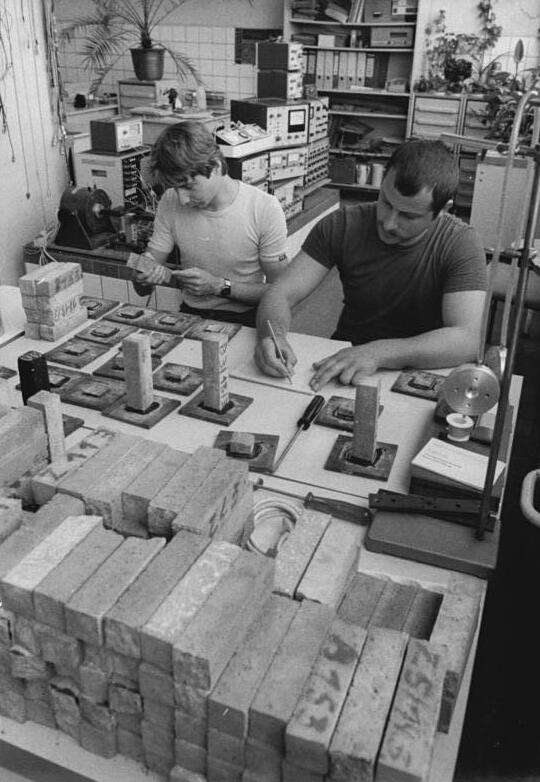 ADN-ZB-Settnik-18.10.1985-Cottbus: Hochschulforschung. Zur Nutzung von Flugaschen in der Bauindustrie werden an der Ingenieurhochschule Cottbus Grundlagenforschungen und angewandte Forschungen durchgeführt. Die Diplomanden Frank Holm (r.) und Uwe Rietz untersuchen für ihre Diplomarbeit zum Thema Substitution von Fortlandzement durch Flugaschen die Wirkungen unterschiedlicher Zusammensetzung. Mit den Ergebnissen der Untersuchungen werden Parameterfunktionen der Biegezugfestigkeit entwickelt. Die Ingenieurhochschule Cottbus, die 1969 als technische Hochschule gegründet wurde, bildet Ingenieure für das Bauwesen aus. Das 4jährige Studium ist die effektivste Form der Qualifizierung für Facharbeiter mit Abitur, beziehungsweise für junge Leute, die einen Bauberuf erlernt haben und in einem einjährigen Sonderlehrgang die Hochschulreife erwerben.